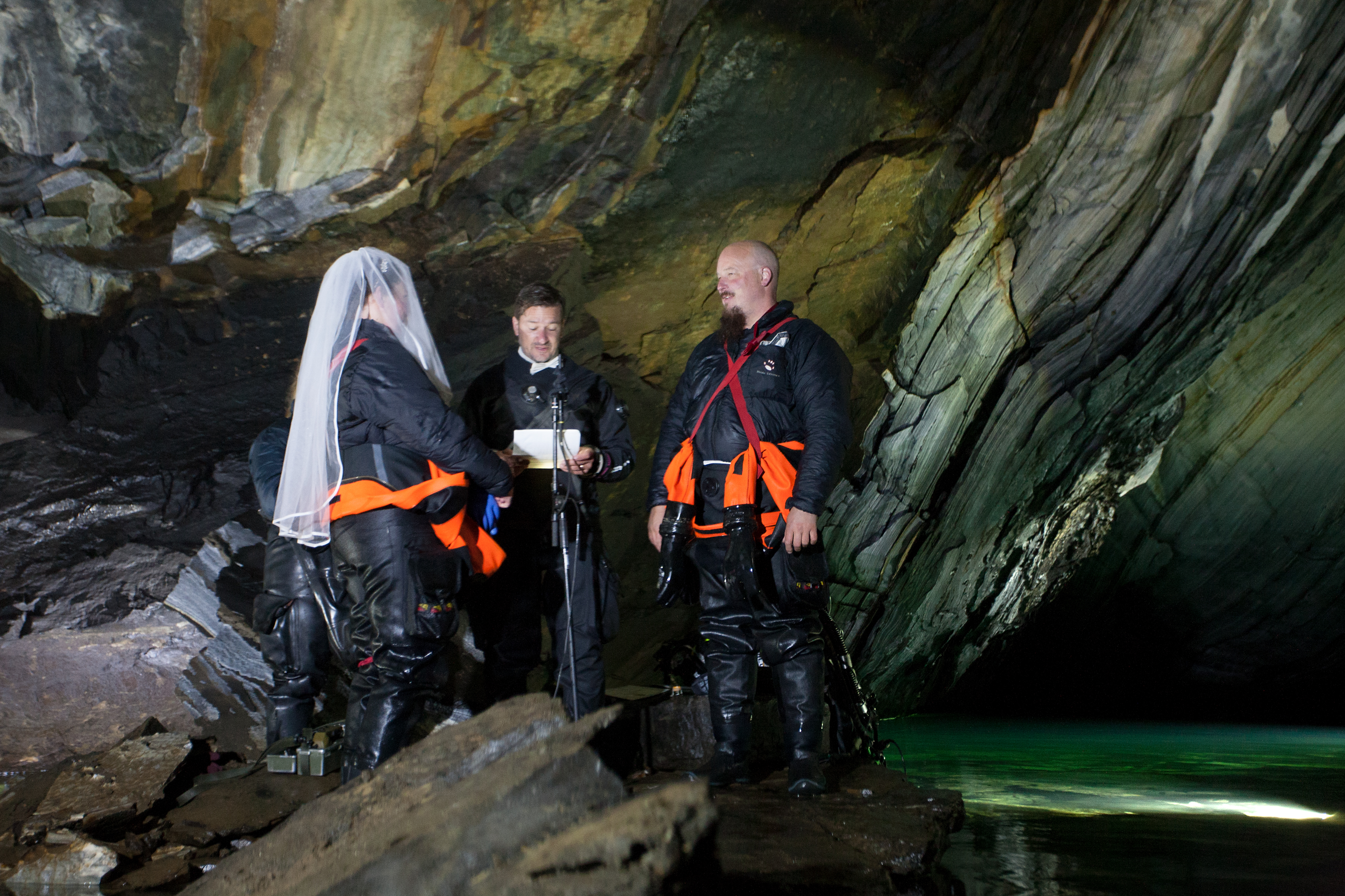 Verdensrekord, verdens største bryllup i vannlås. 69 dykkere var del av seremonien. Her er brudeparet.